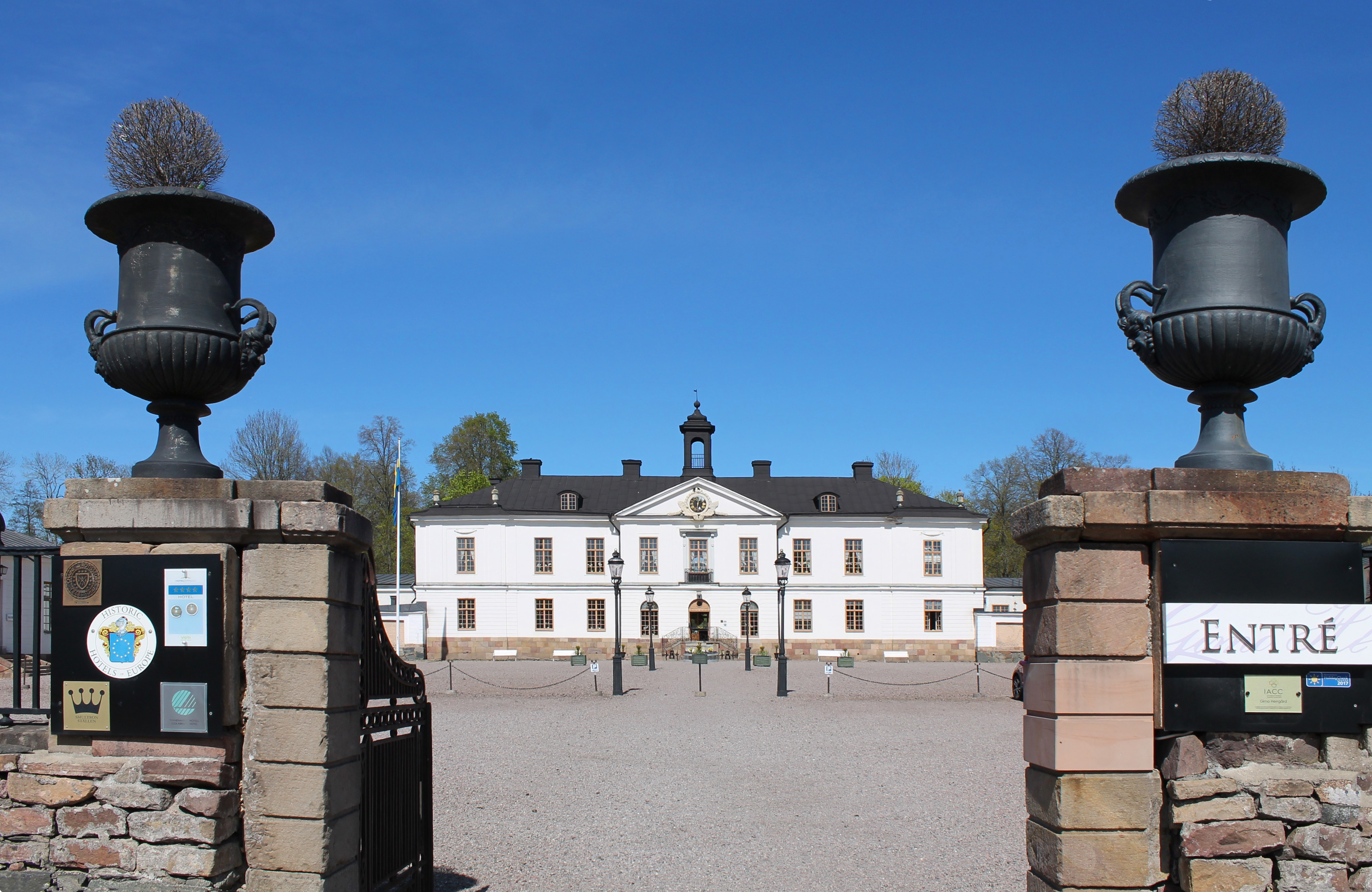 Grinden till Gimo herrgård, själva huvudbyggnaden syns i mitten.